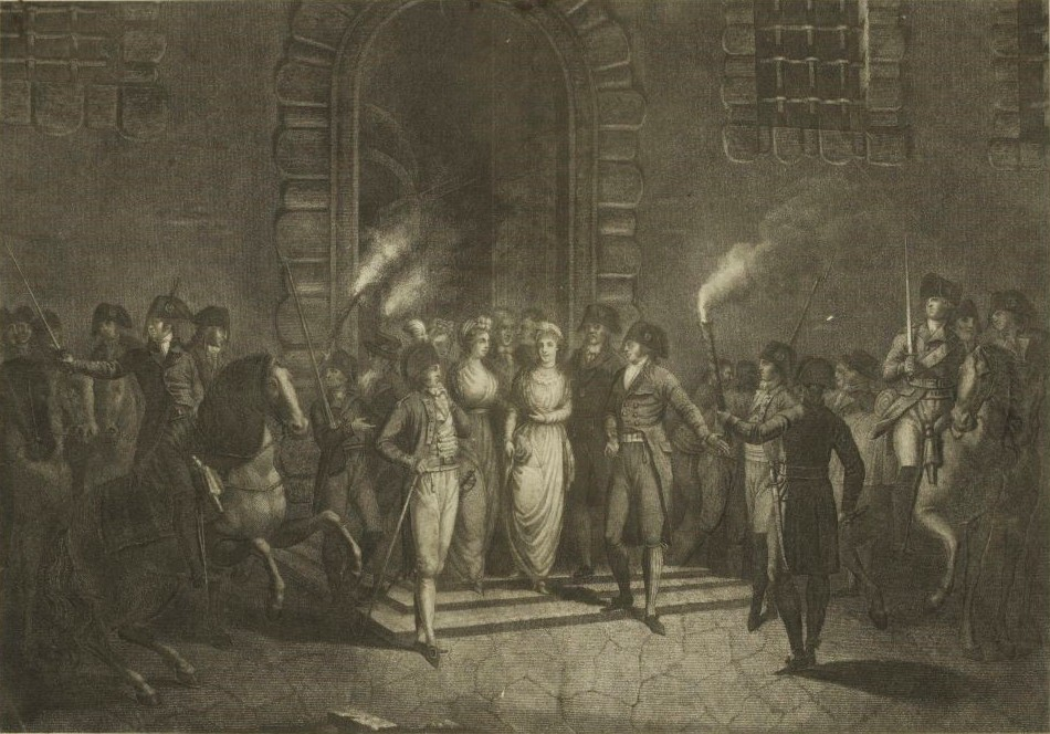 Départ de la tour du Temple de Marie-Thérèse de France le 19 décembre 1795 pour la Suisse.